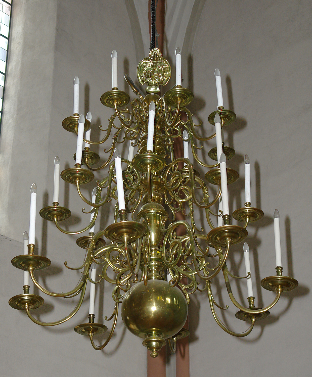 St. Stephani in Bremen: Kronleuchter mit Inschriften 17. Jh. im Nordschiff